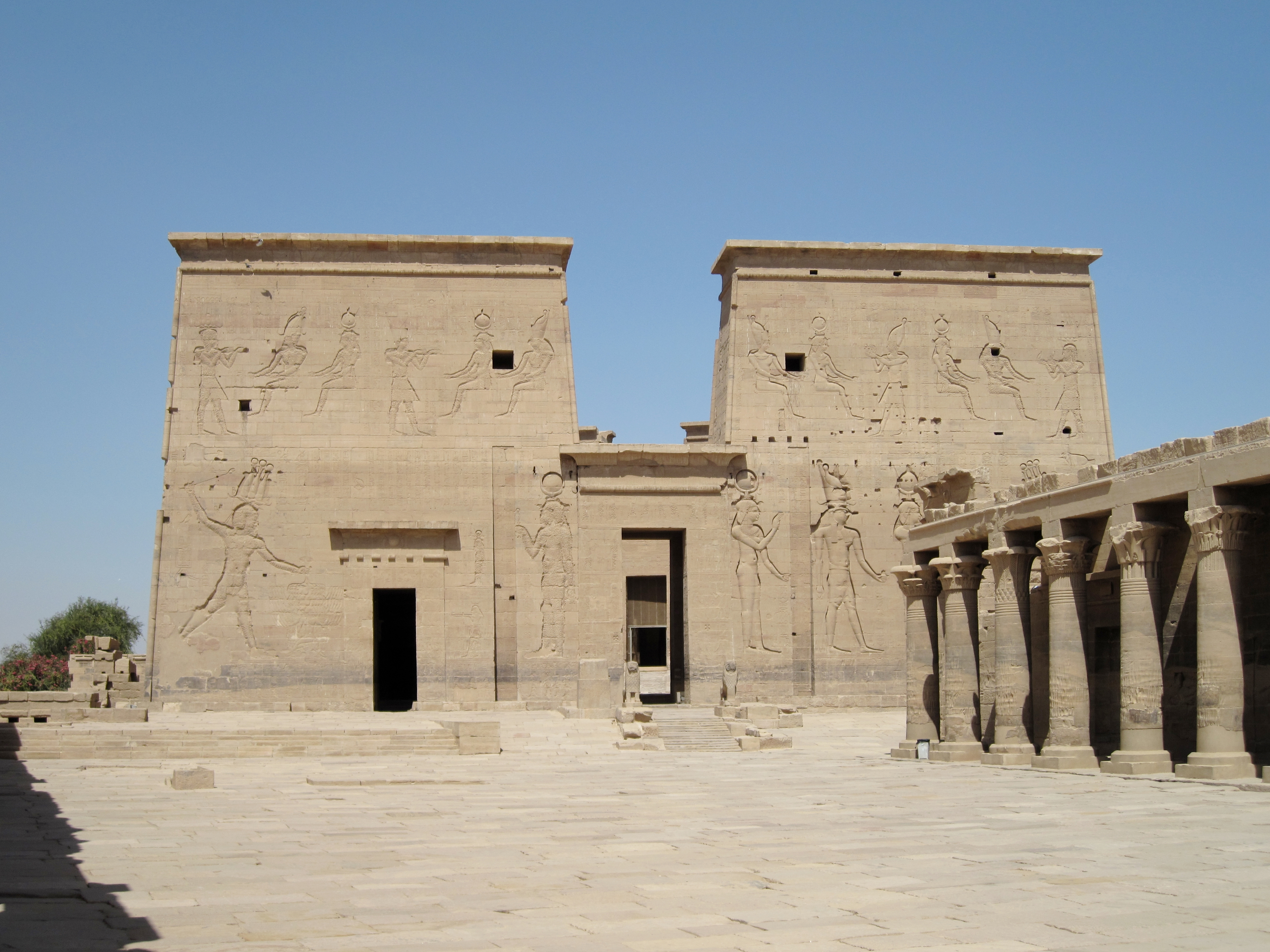 Erster Pylon des Isis-Tempels von Philae auf der Insel Agilkia, Ägypten